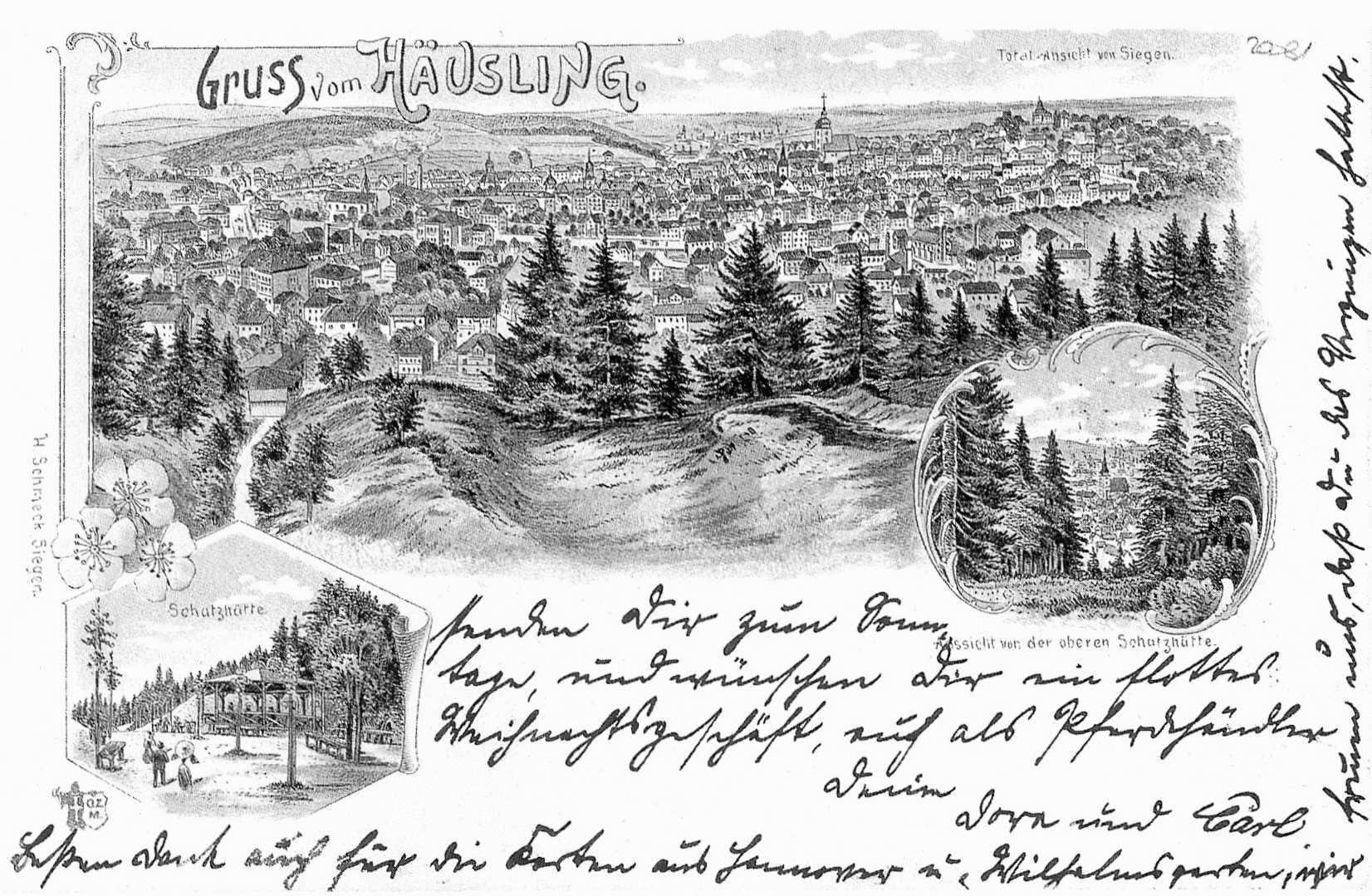 Siegen/Westfalen: Ansichtskarte „Gruss vom Häusling“ aus dem Jahr 1895 mit Panoramazeichnung der Siegener Kernstadt auf dem Siegberg, gesehen von Süden. Im Vordergrund der Hang des Berges Häusling.